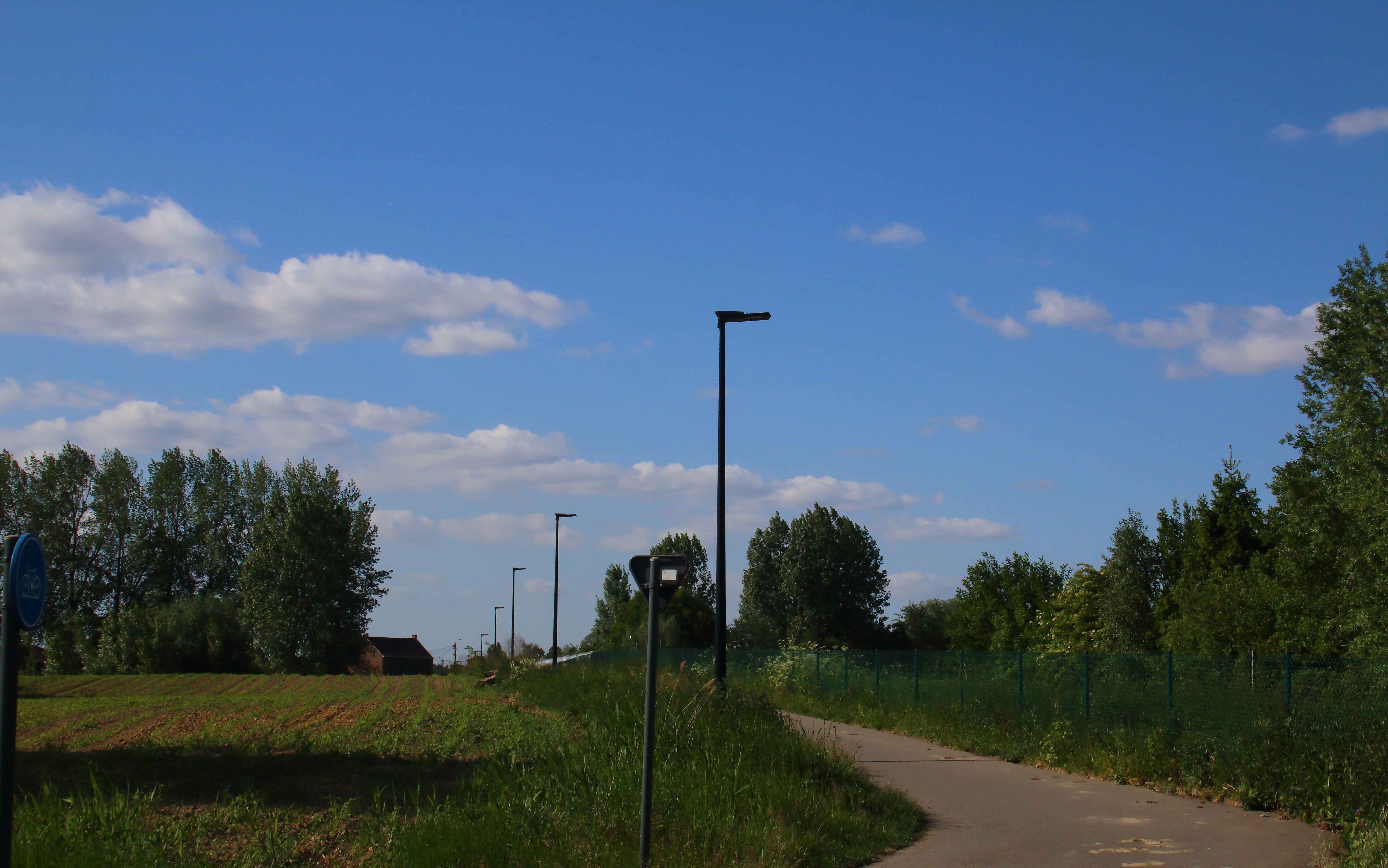 Fietssnelweg F417, Balegem, Oosterzele, Vlaanderen, België